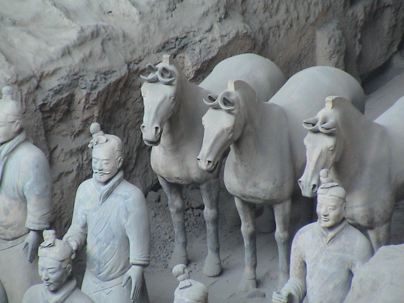 Terracotta Army